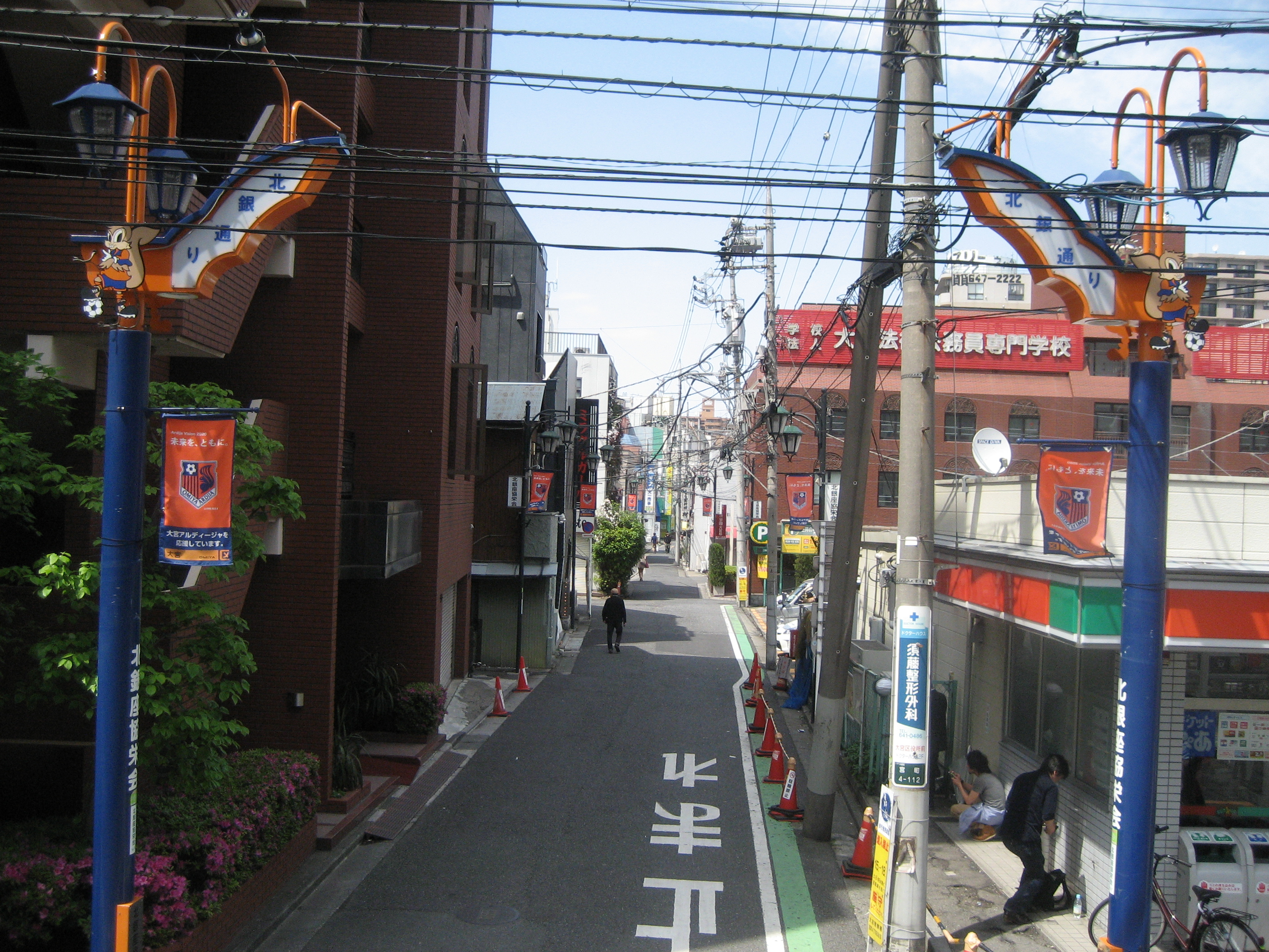 さいたま市大宮区にある北銀通り入口付近